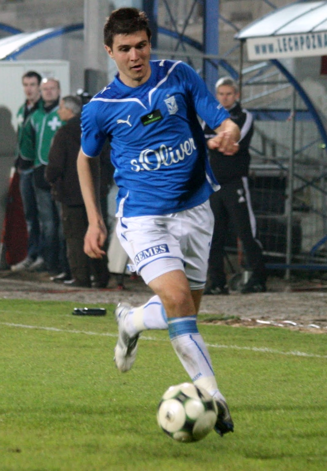 Lech - Legia 178.jpg